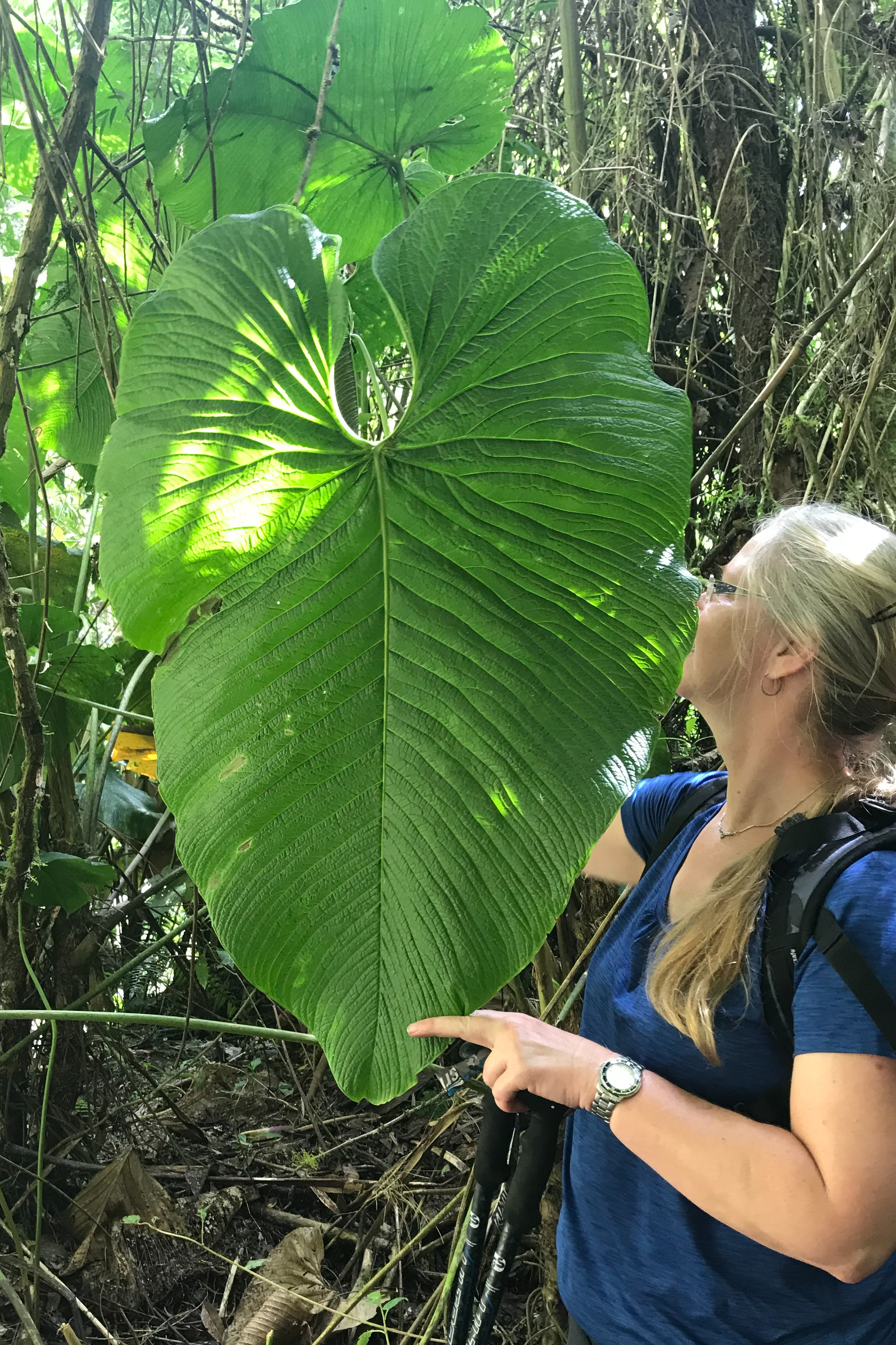 Tropisches Blatt (Art unbekannt), Ecuador, Provinz Pastaza, Nähe Pujo